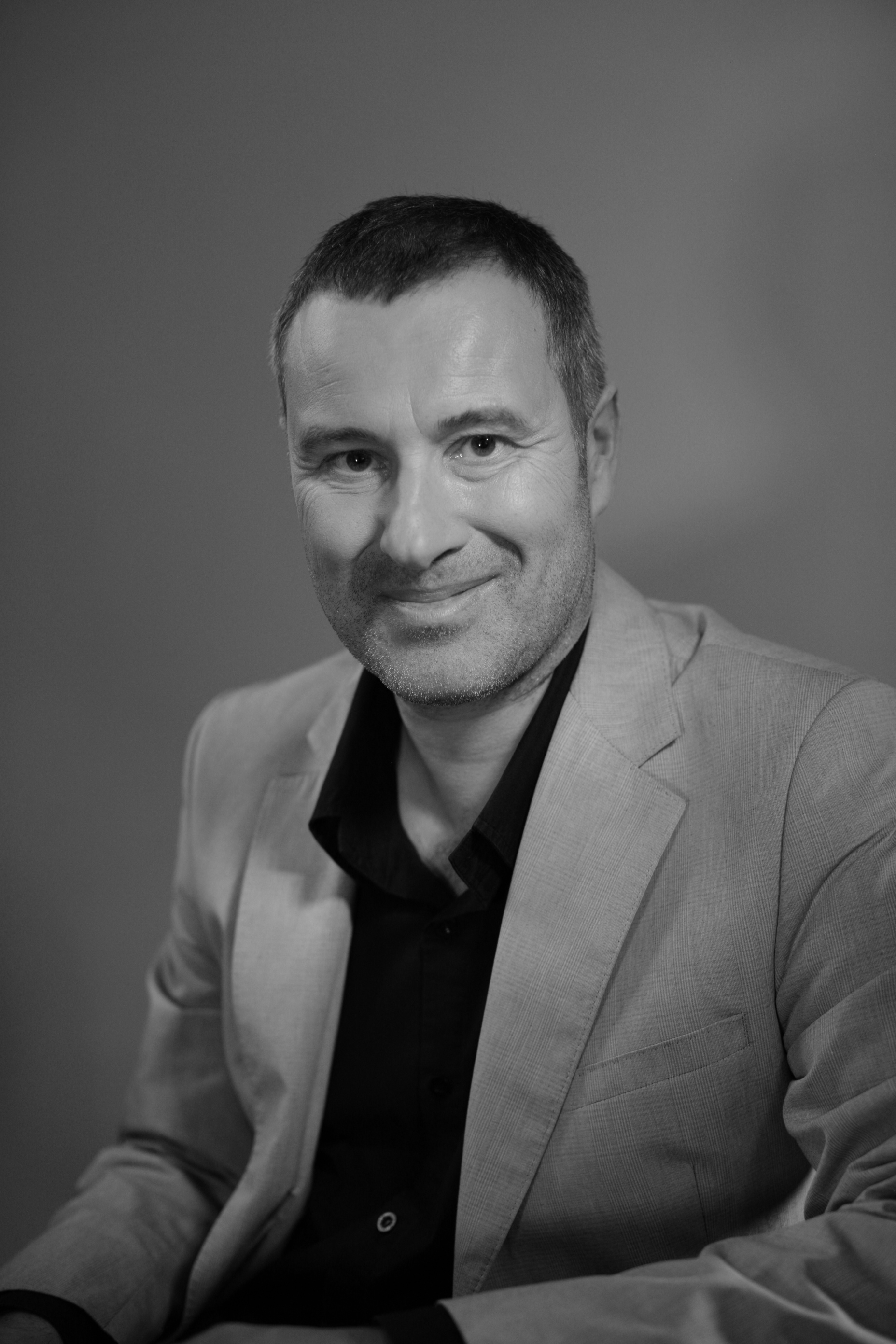 Jens-Otto Paludan